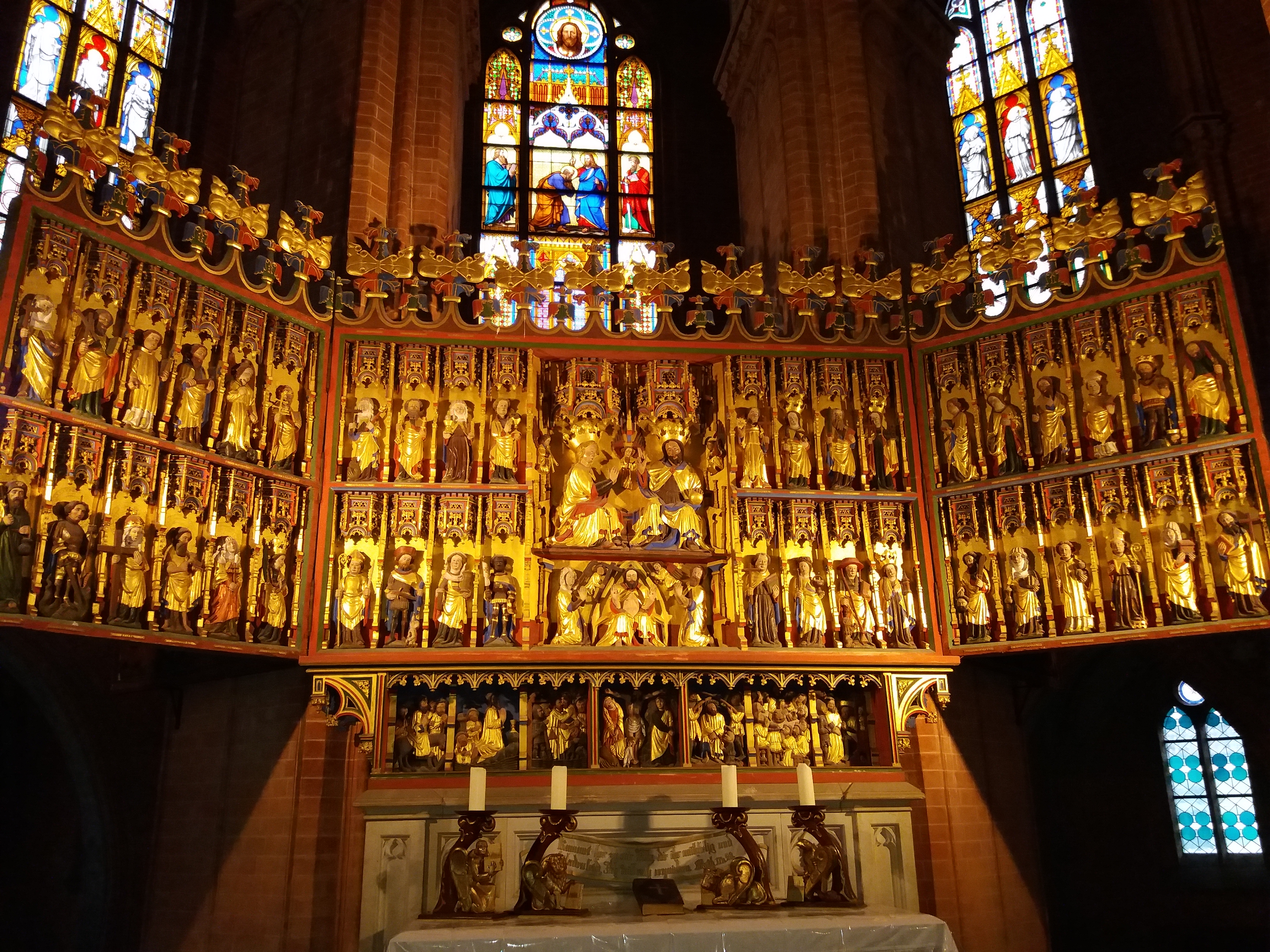 Mittelalterlicher Schnitzaltar der St. Peter-Kirche in Altentreptow